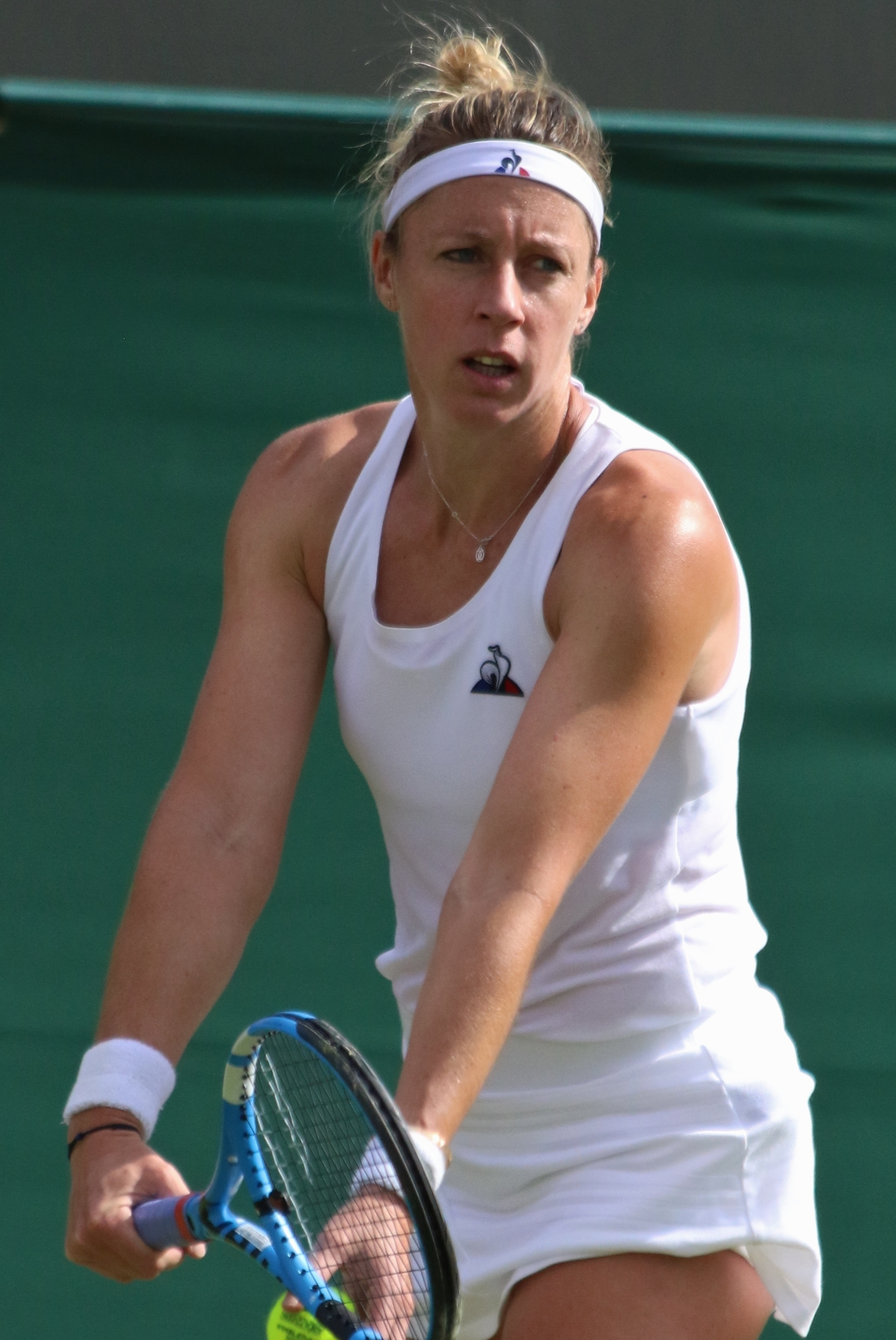 Parmentier WM19 (19)